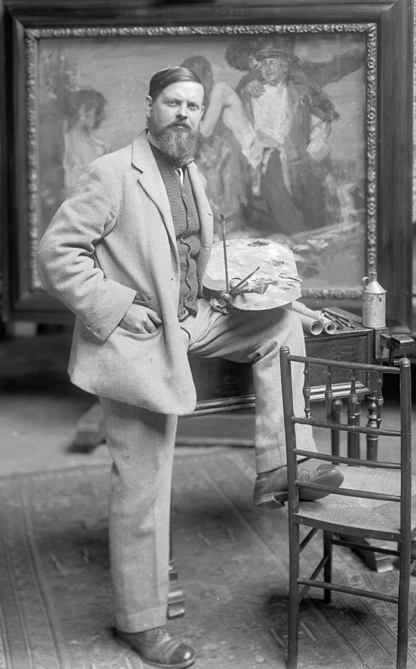 Frank Brangwyn, Welsh Artist Painter